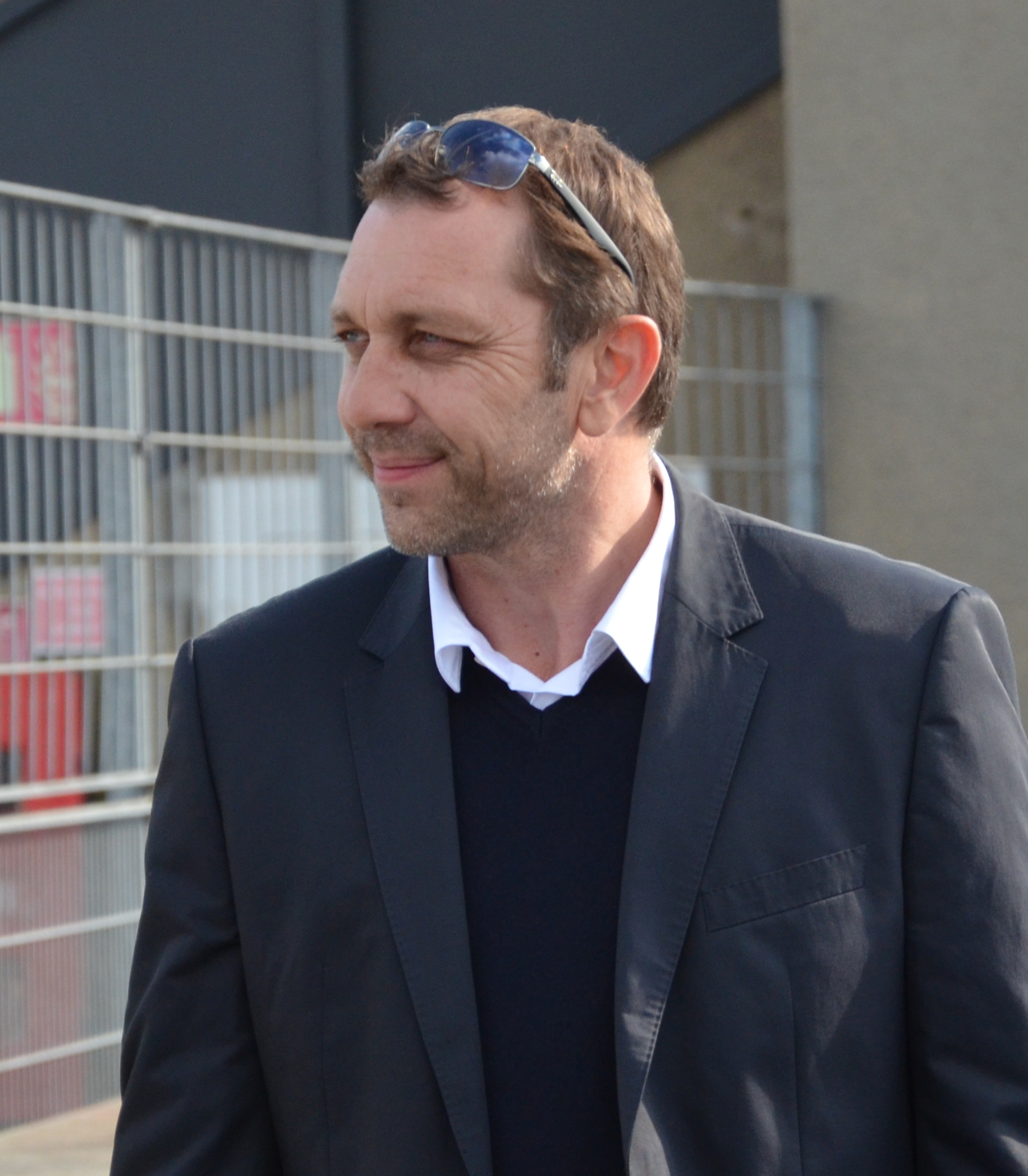 Photographie prise à l'occasion de la rencontre amicale opposant le Stade Malherbe de Caen au Stade rennais, le 9 juillet 2014 au stade Pierre-Comte de Vire. Ici, Xavier Gravelaine.